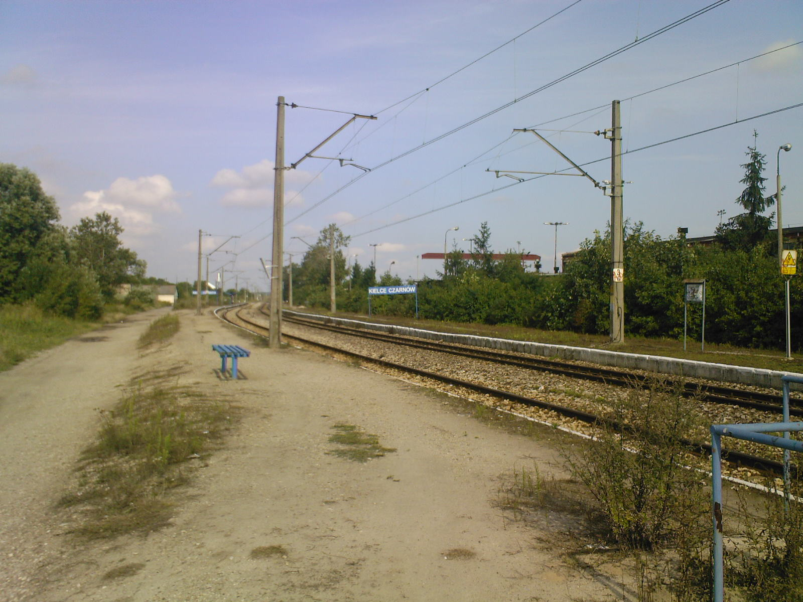 Stacja Kielce Czarnów - widok w kierunku zachodnim